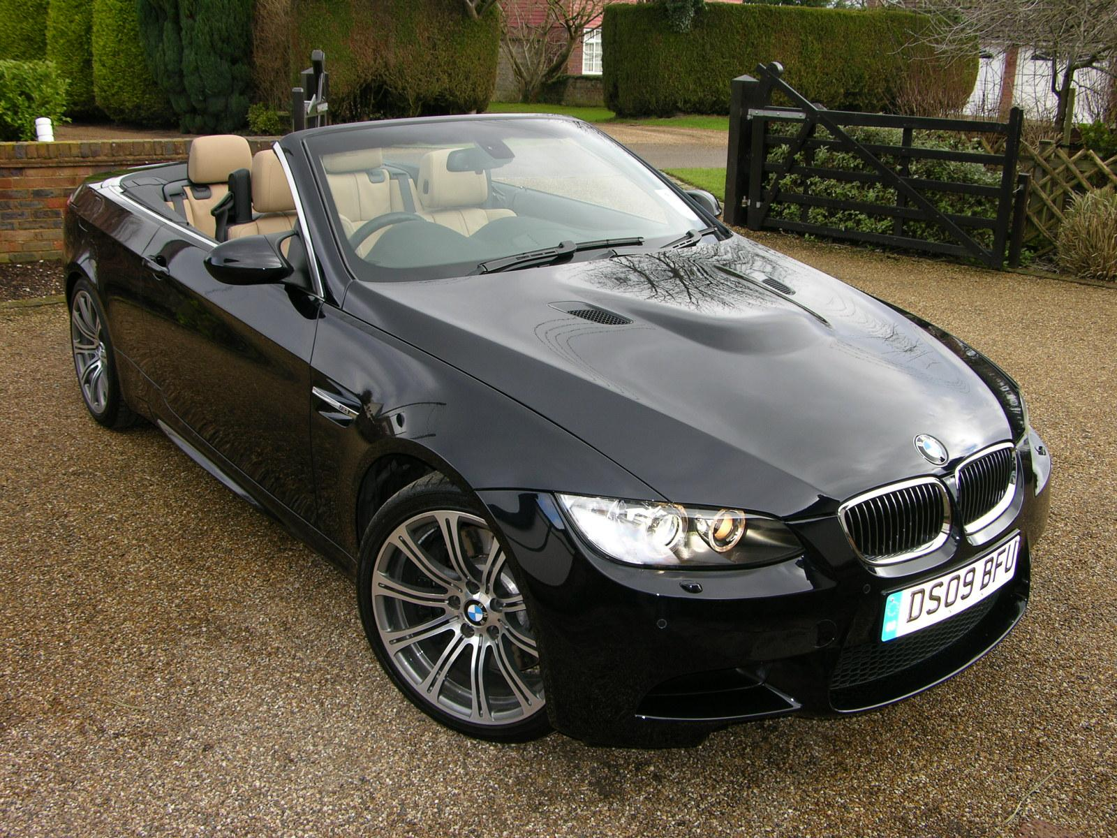 2009 BMW M3 Cabriolet